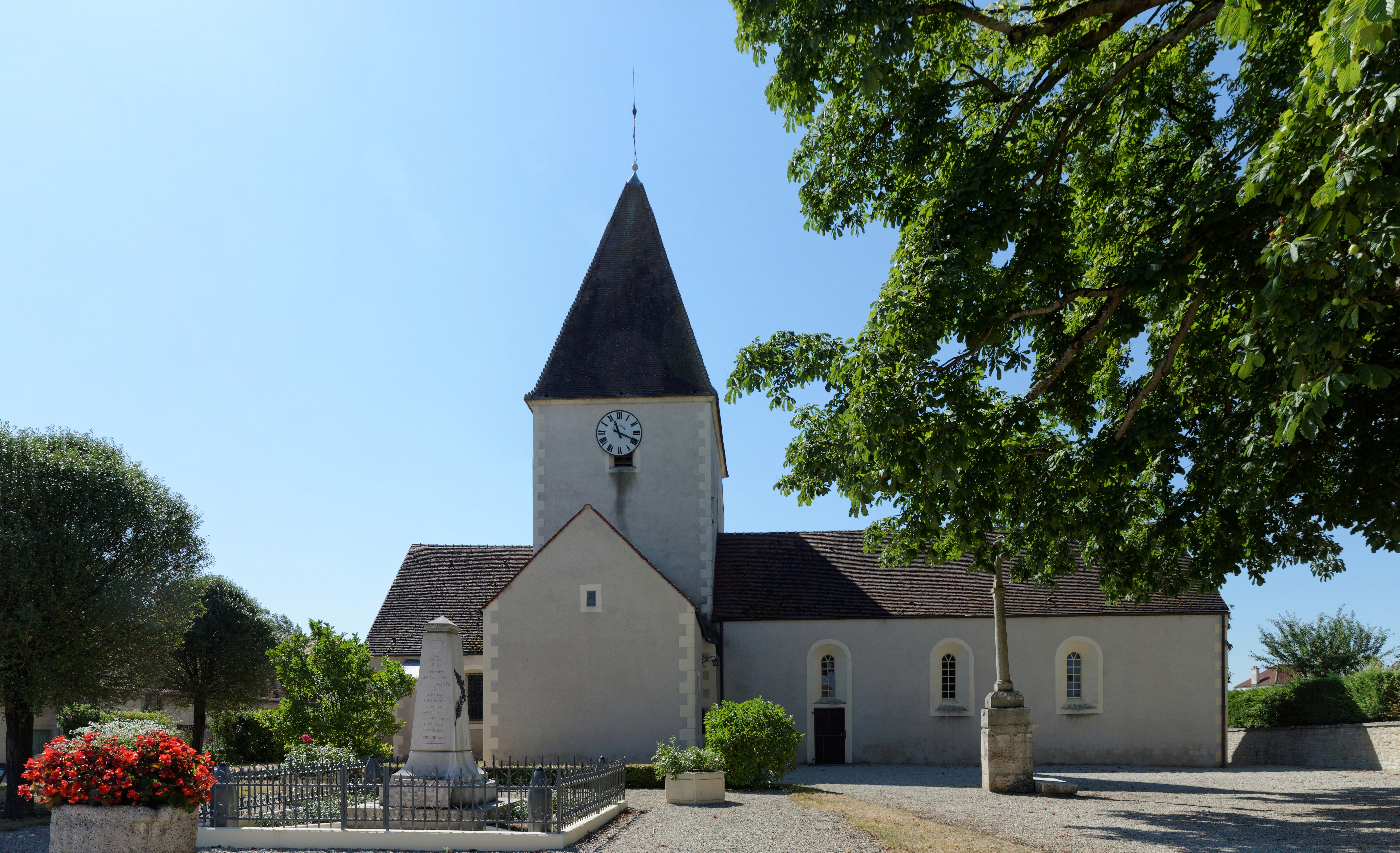 Église de Cessey-sur-Tille. (Côte d'Or, Bourgogne, France)